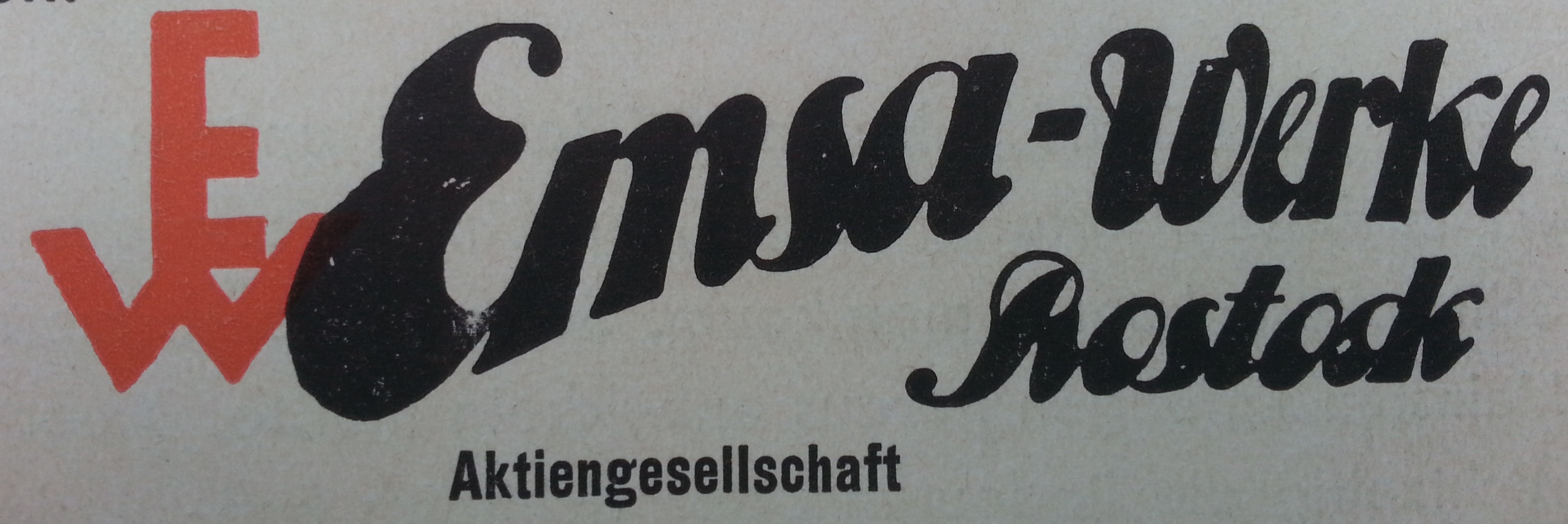 Signet der Firma EMSA-Werke, 1906 bis 1916 in Güstrow, 1916 bis 1941 in Rostock, ab 1939 arisiert, 1938 bis 1960 als EMSA-Works in Blackburn (Eigentümerfamilie Samuel)